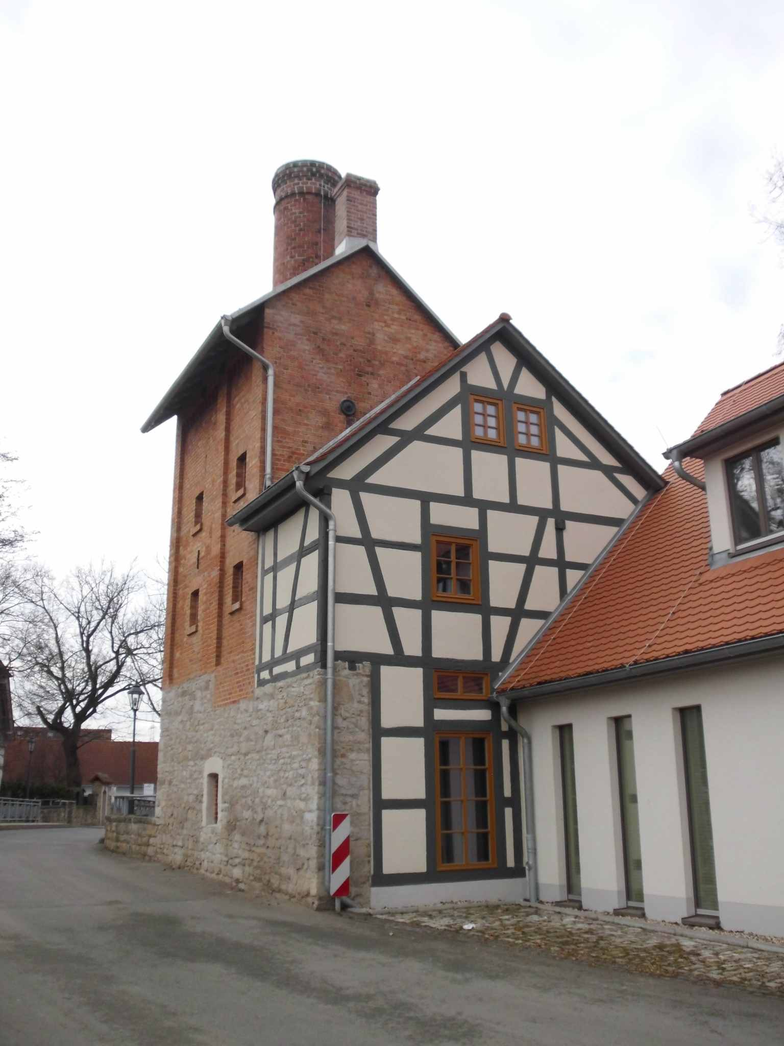 Malzdarre Mellingen